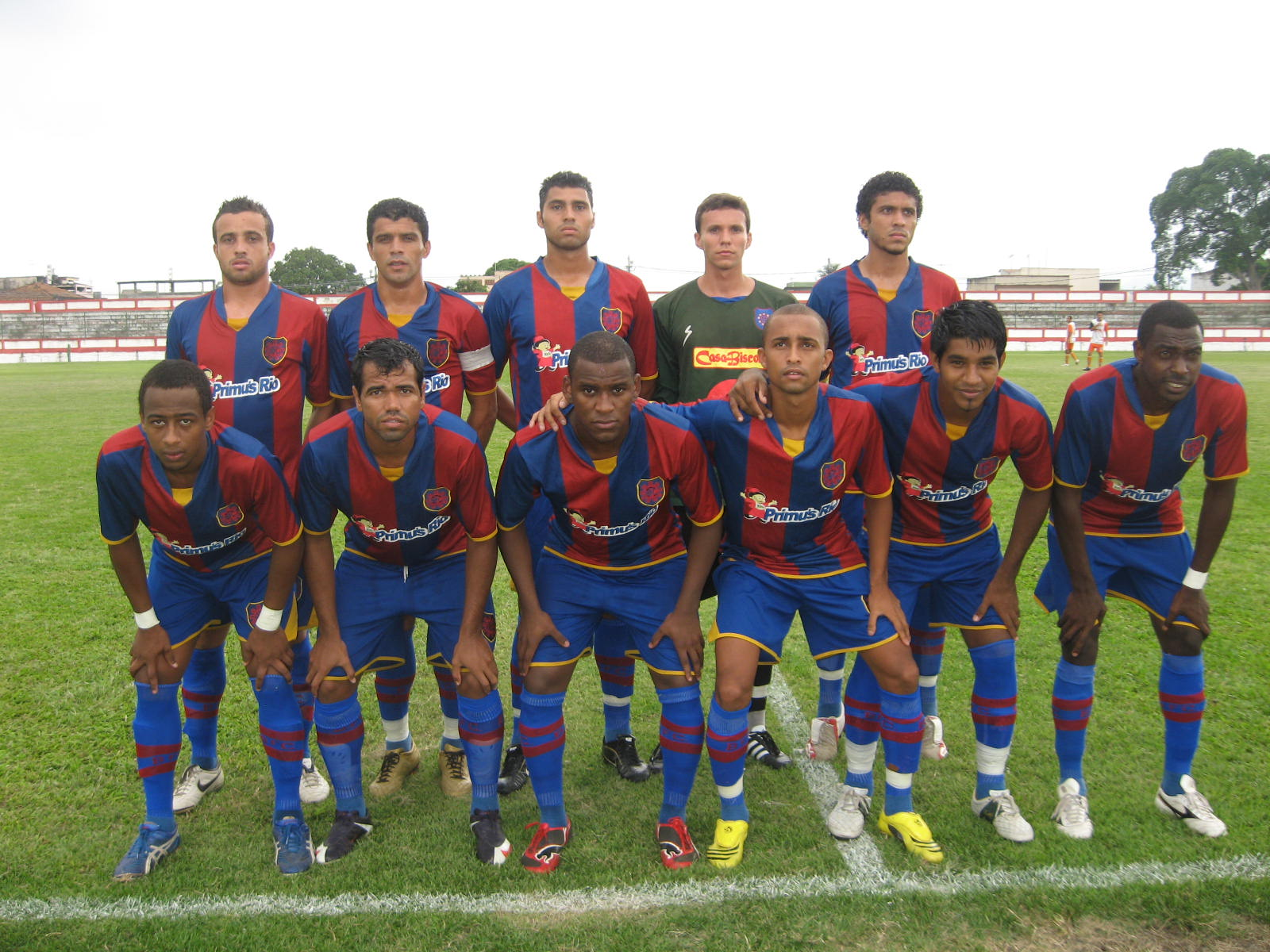 Equipe profissional do Bonsucesso Futebol Clube em 2009.